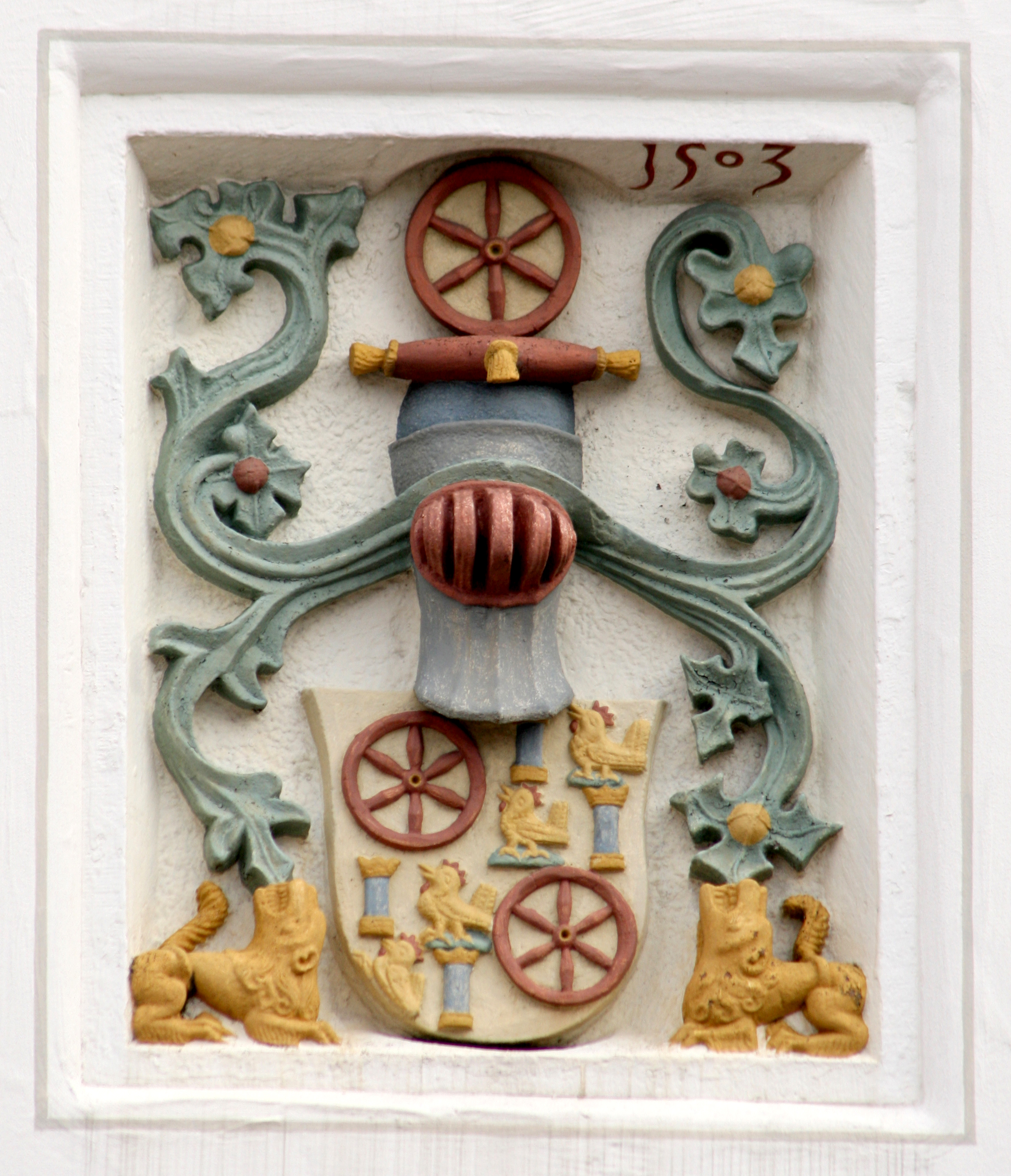 Wappen des Erzbischofs Berthold von Henneberg (Kurfürst von Mainz, 1503 bis 1543) über dem Spitzbogenportal des alten Mudauer Rathauses, falsch bemalt (siehe auch [1]